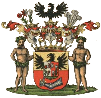 Dunteni suguvõsa krahvivapp